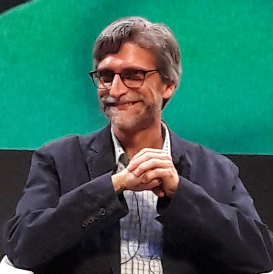 Marc Ceccarelli au festival international d'animation d'Annecy 2019.